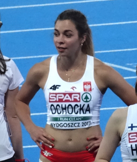 Młodzieżowe Mistrzostwa Europy w Lekkoatletyce U23 w Bydgoszczy 13-16 lipca 2017, półfinał biegu na 100 m przez płotki kobiet